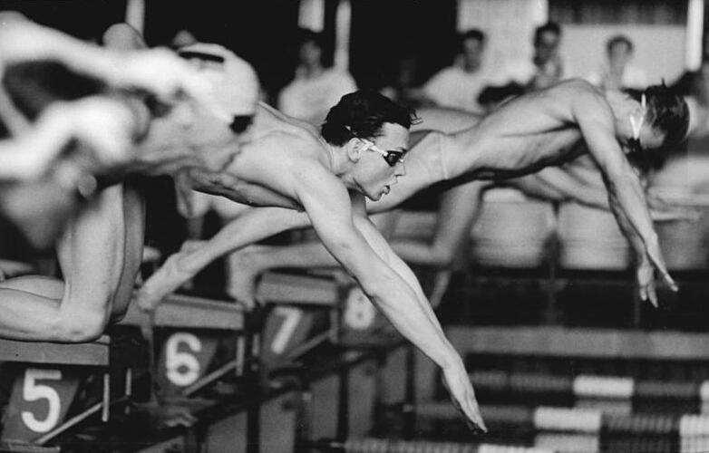 Uwe Daßler ADN-ZB Settnik 17.6.86 Berlin: 37. DDR-Meisterschaften im Sportschwimmen- Start zu ersten Vorlauf über 200 m Freistil der Männer. Der Potsdamer Uwe Daßler (m.) erreichte mit 1:51,01 min die beste Zeit. Bis zum 22.6.86 bewerben sich 280 Aktive in den 32 Schwimm-Entscheidungen um den Titel.